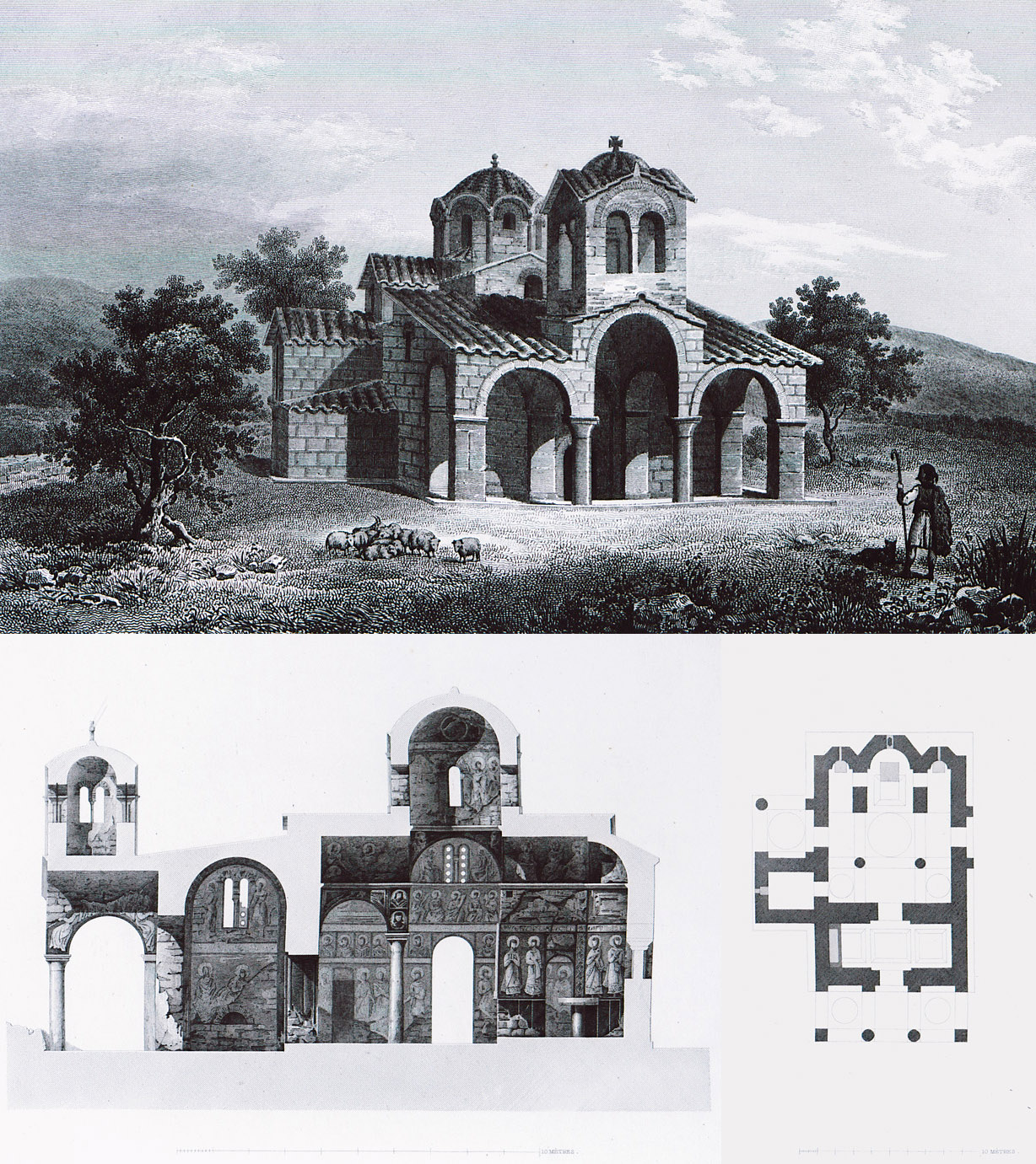 Vue, plan et coupe de l'église de Samari. Cette église, la plus complète et la mieux conservée de toutes celles que nous avons vues en Grèce, est remarquable par la complication de ses combles qui lui donnent un caractère très-pittoresque. Comme tous les monuments de ce genre, sa construction se compose de moellons et de briques liés par un mortier de terre et de chaux. A l'intérieur, qui est entièrement couvert de peintures à fresque, représentant des sujets tirés de l'Ecriture-Sainte, sont deux colonnes en marbre veiné, supportant l'un des côtés de la coupole du milieu; deux colonnes et deux piliers en pierre noircis par le temps soutiennent le porche d'entrée de la façade principale; et une autre colonne, également en pierre, porte l'angle du porche latéral. Près de cette église sont des fragments de colonnes qui paraissent avoir appartenu à un monument antique.